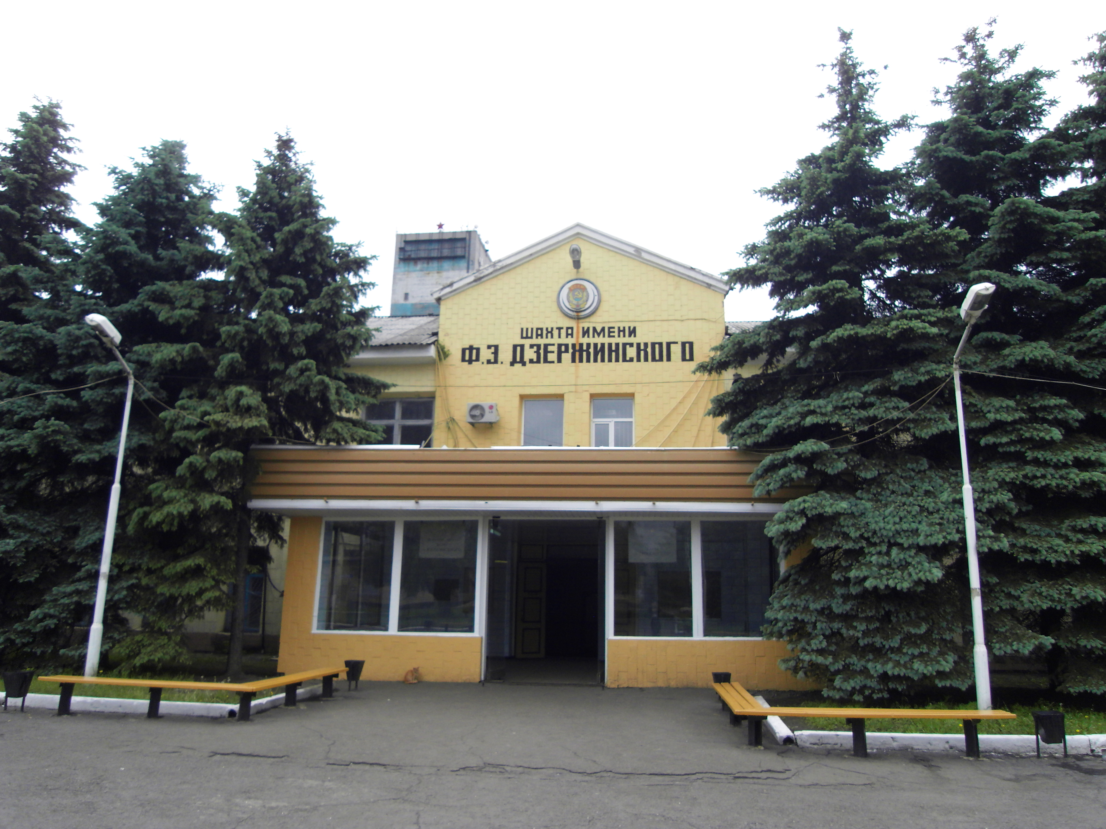 Шахта імені Дзержинського